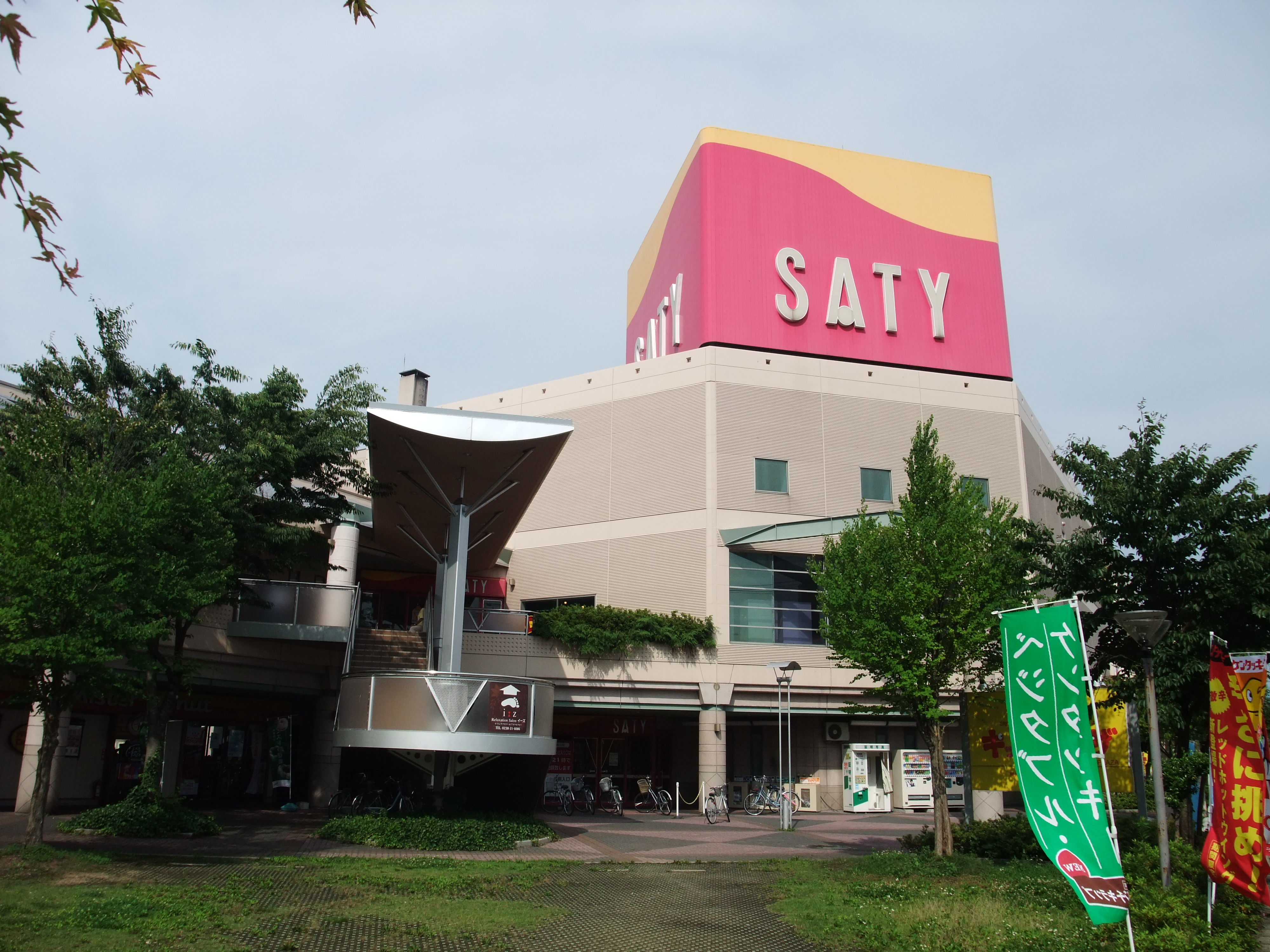 米沢サティの外観